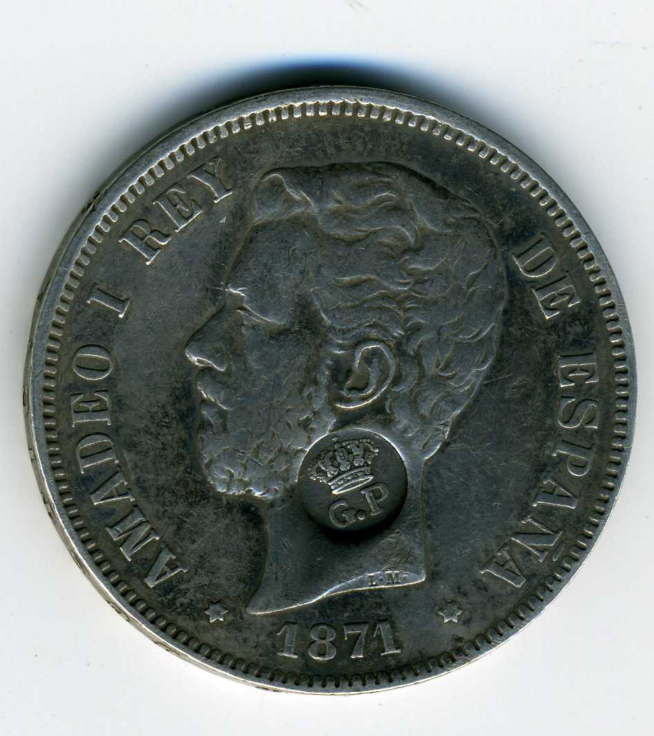 Moneda con punzón para Azores